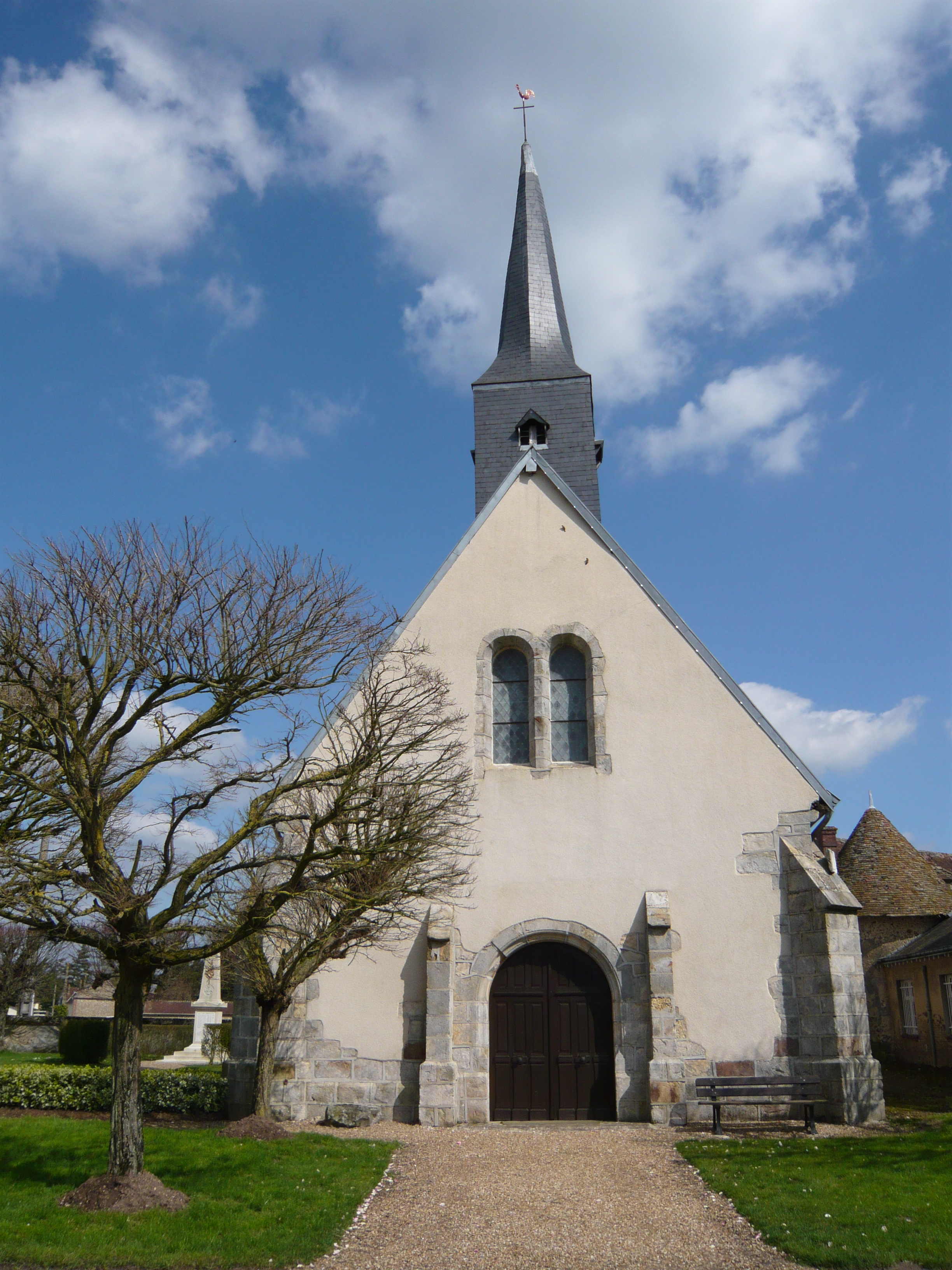 Église de Croisilles, Eure-et-Loir (France).